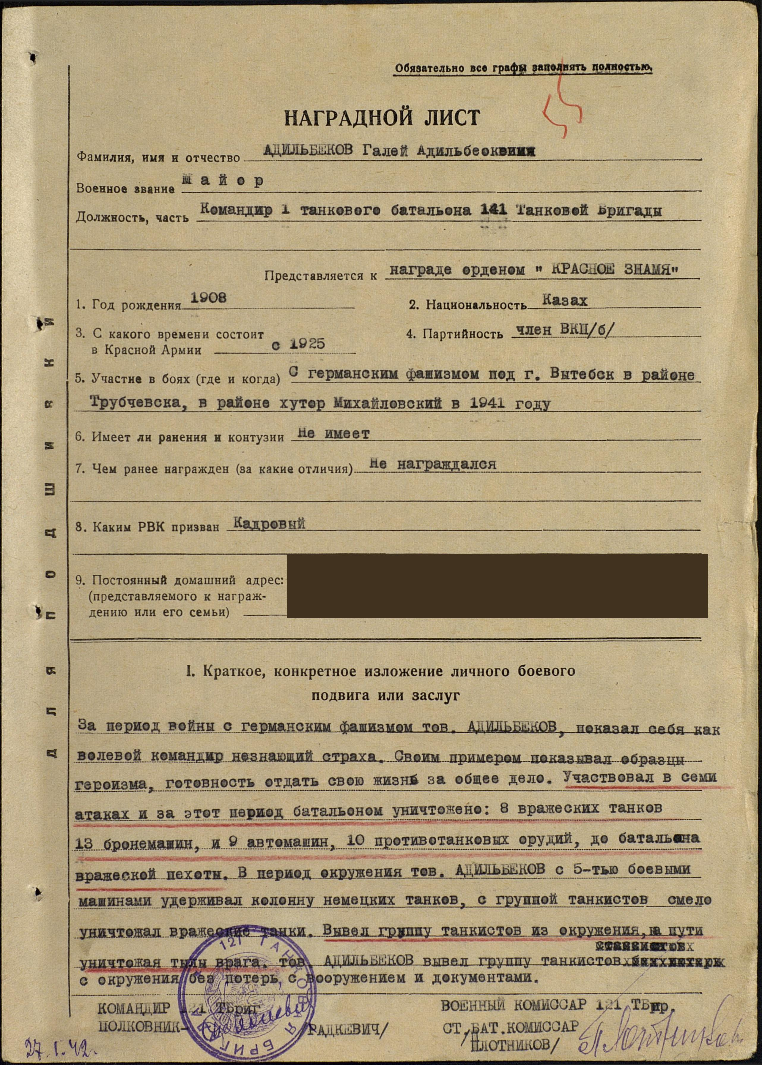 Наградной лист от 27 января 1942 г за подвиг - Адильбеков Галий Адильбекович